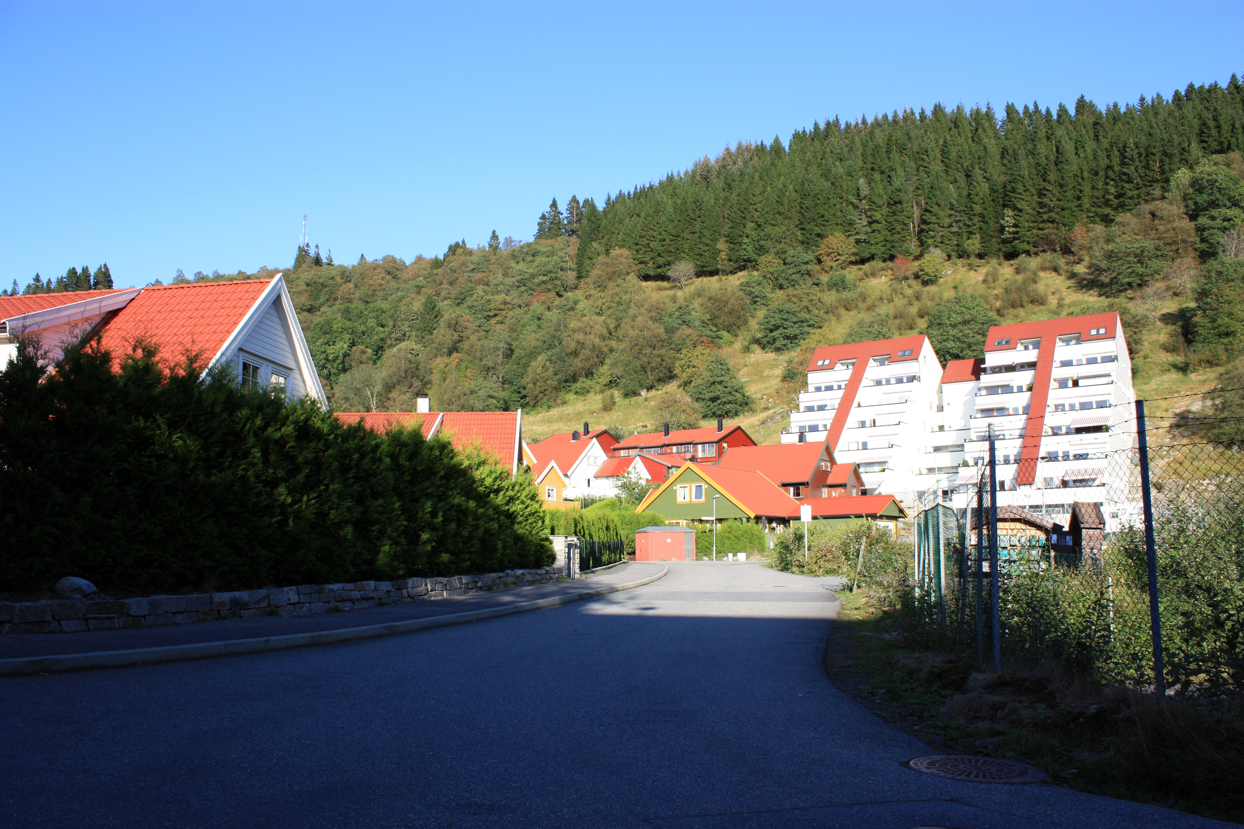 Midtunlia, Fana, Bergen.